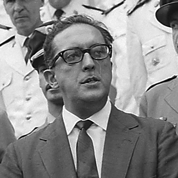 Fundo Agência Nacional.